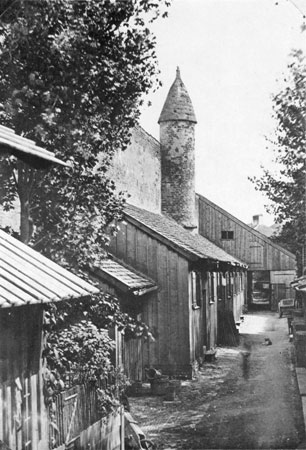 Das Fausttürmchen in München